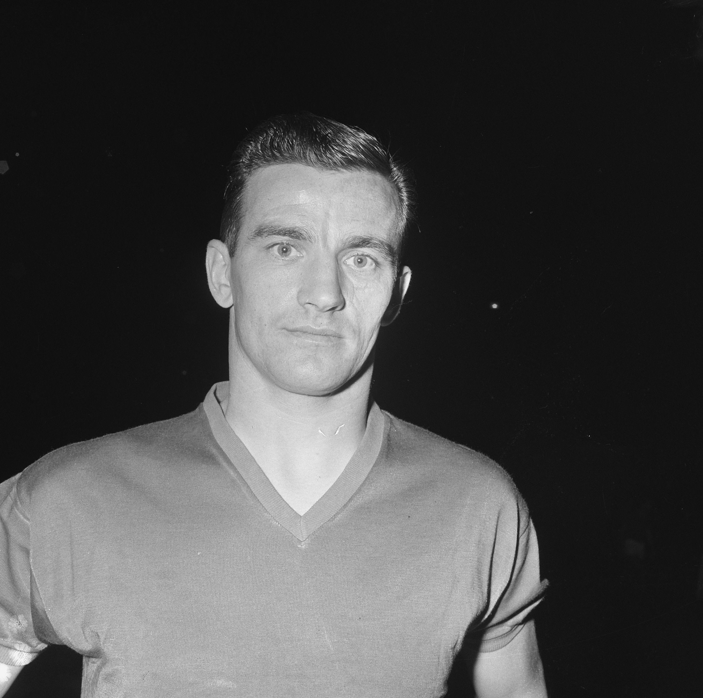 Collectie / Archief : Fotocollectie Anefo Reportage / Serie : [ onbekend ] Beschrijving : Spelers Standaard Luik, Jef Vliers (kop) Datum : 16 september 1965 Trefwoorden : spelers, sport, voetbal Instellingsnaam : Standard Luik Fotograaf : Nijs, Jac. de / Anefo Auteursrechthebbende : Nationaal Archief Materiaalsoort : Negatief (zwart/wit) Nummer archiefinventaris : bekijk toegang 2.24.01.03 Bestanddeelnummer : 918-1931